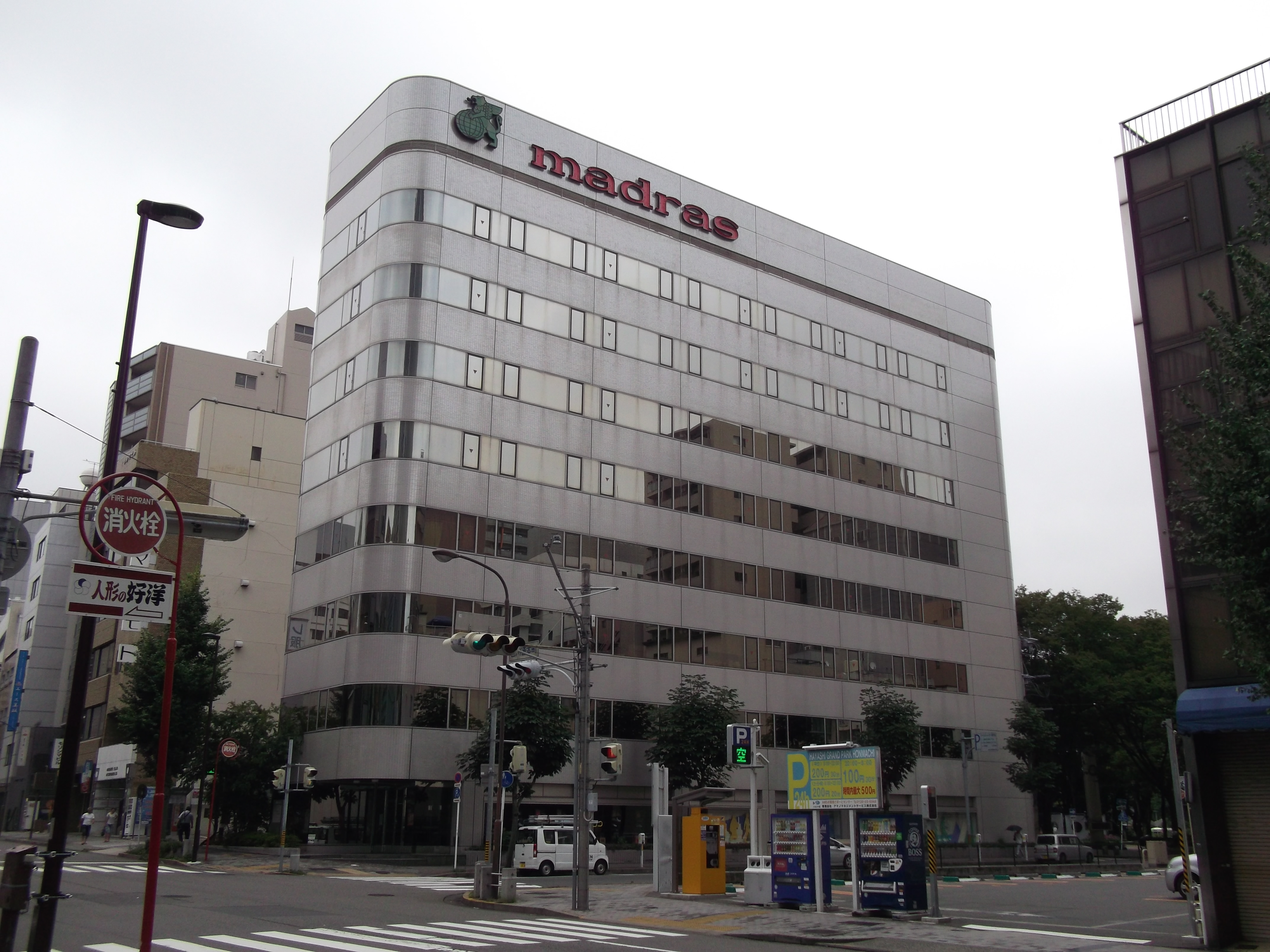 名古屋市中区栄のマドラス本社を東側公道北側より撮影